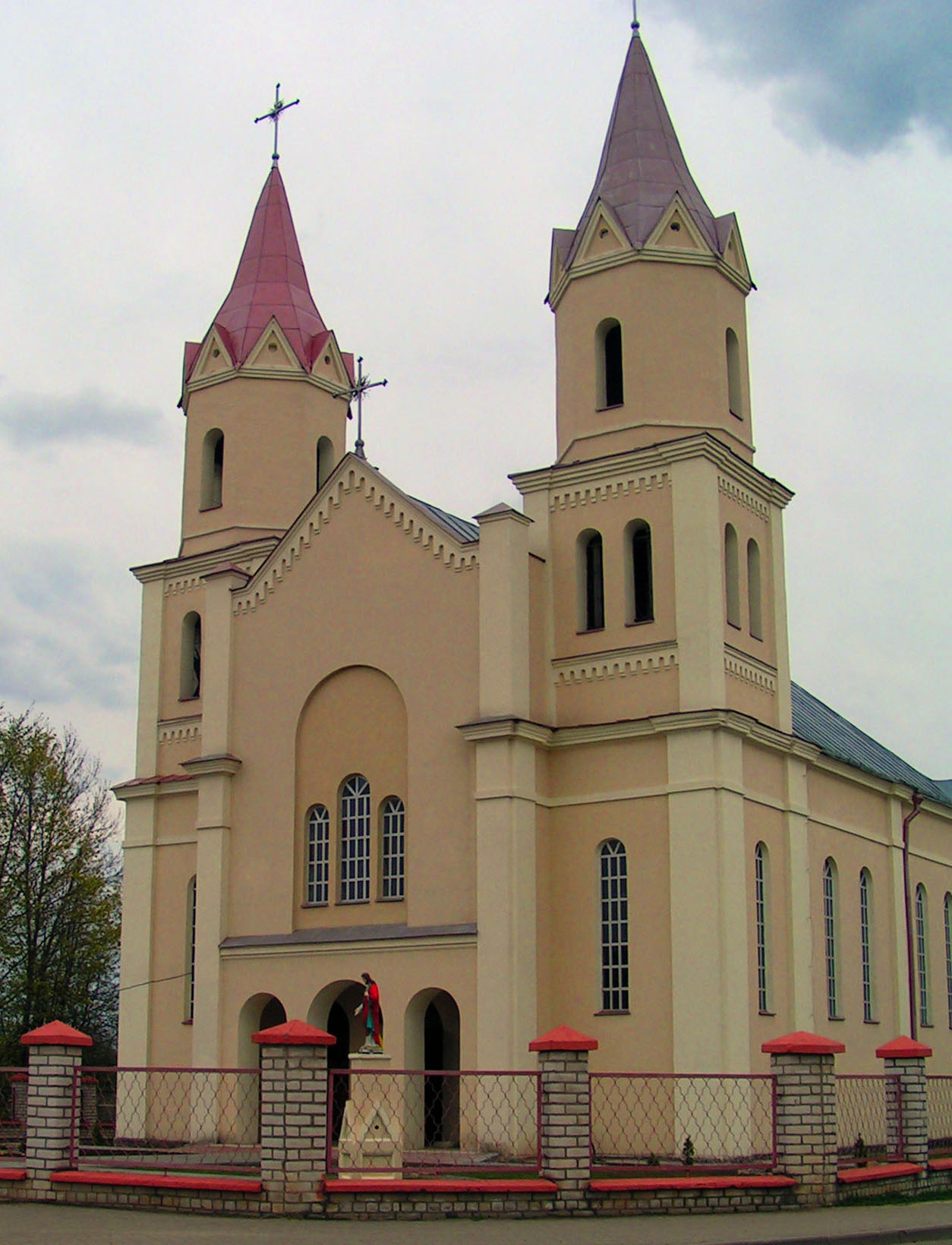 Беларуская (тарашкевіца): Касьцёл Сьв. Юрыя. в. Пяршаі